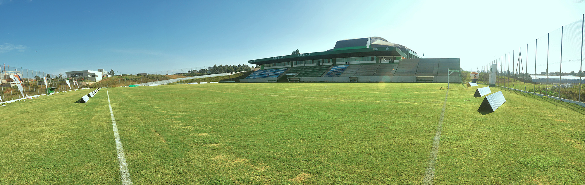 Panorama do novo Estádio Wolmar Salton, do Sport Clube Gaúcho de Passo Fundo-RS, visto a partir de um dos escanteios